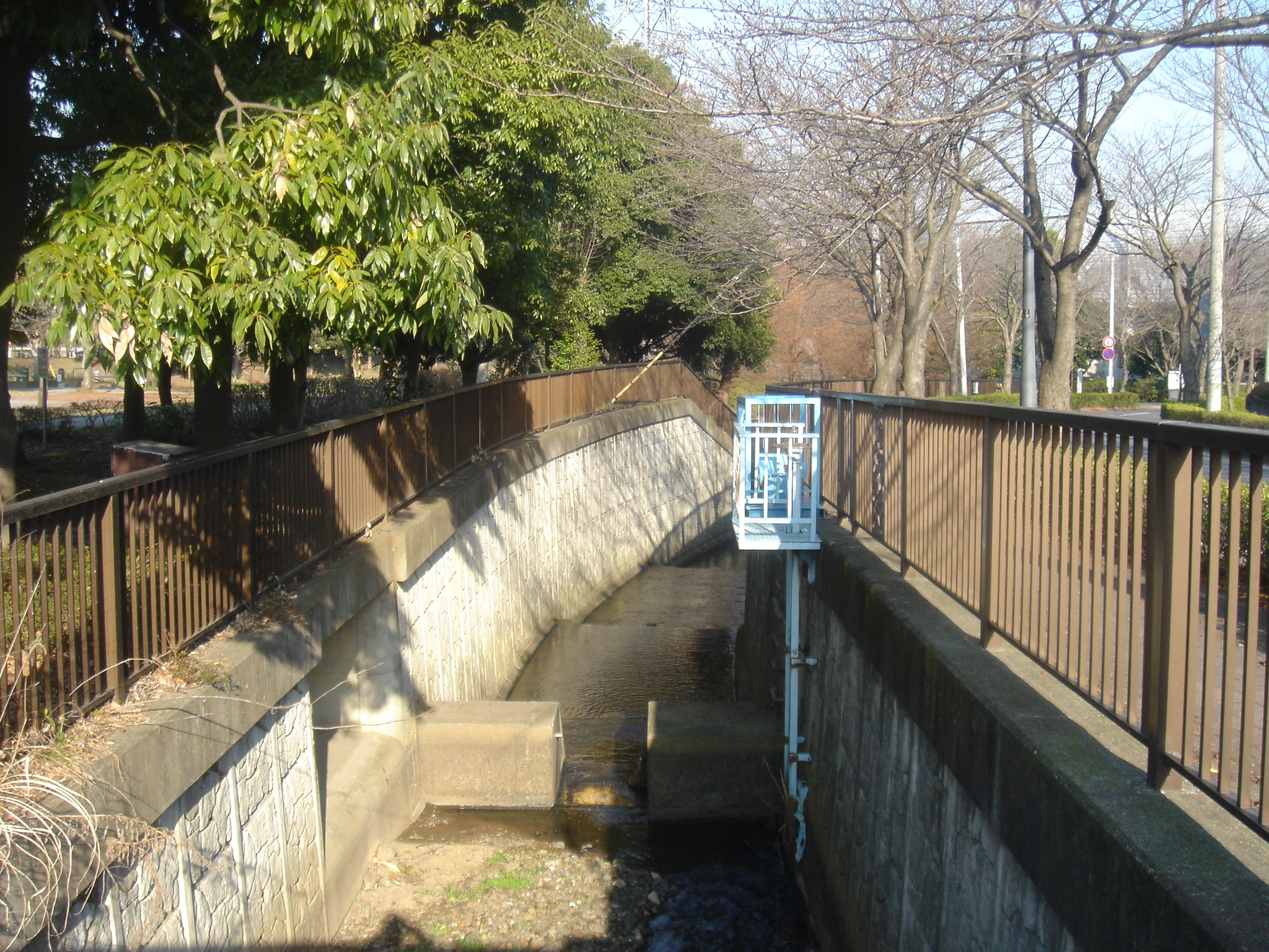 from Shimo Bando Bridge